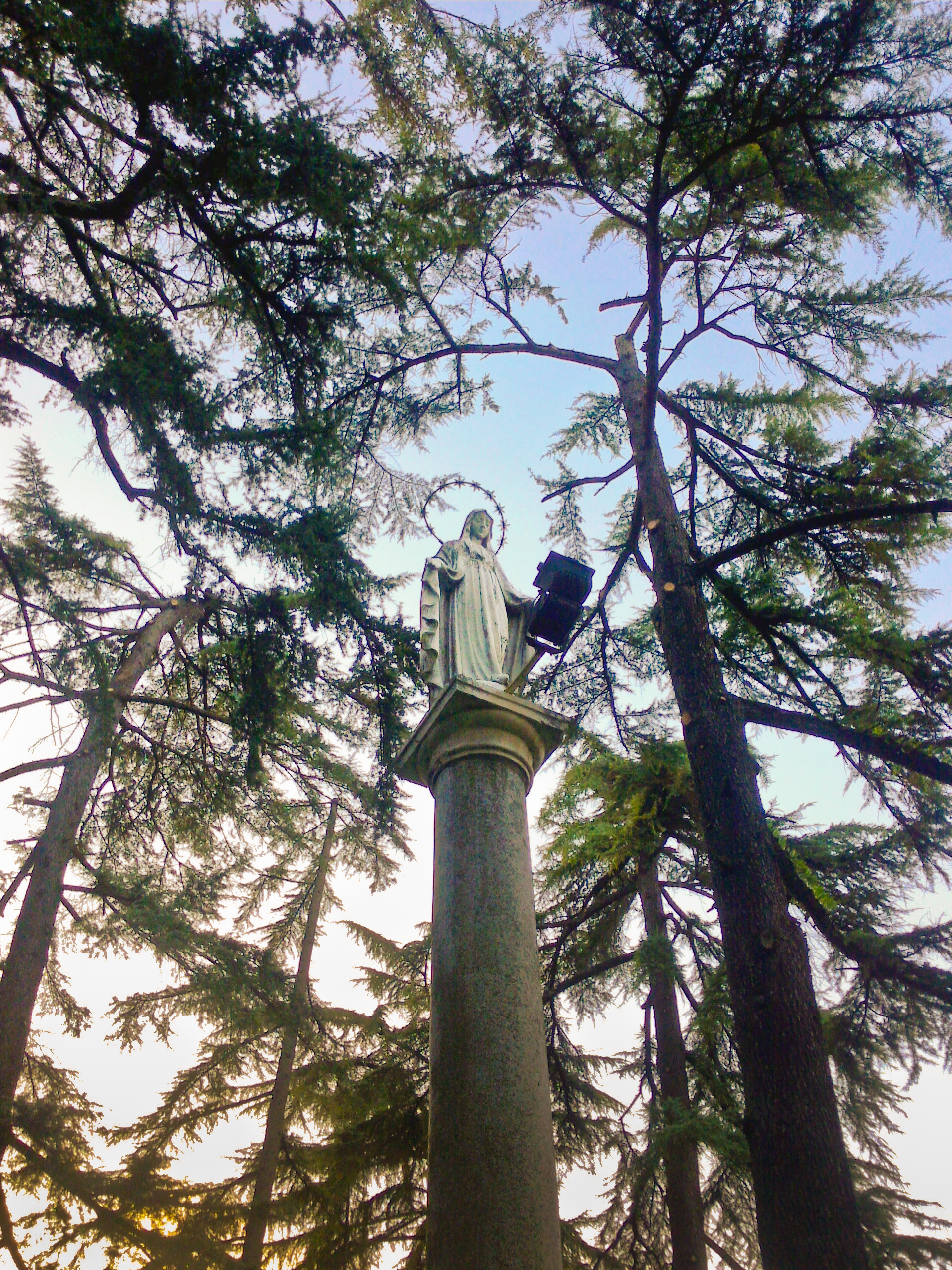 Una statua mariana nei giardini nella zona centrale di Ceccano (Lazio, Italia)